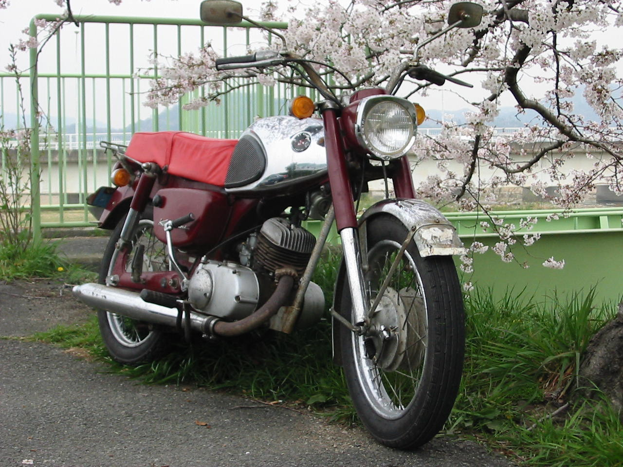 B8 is a motorcycle made by Kawasaki